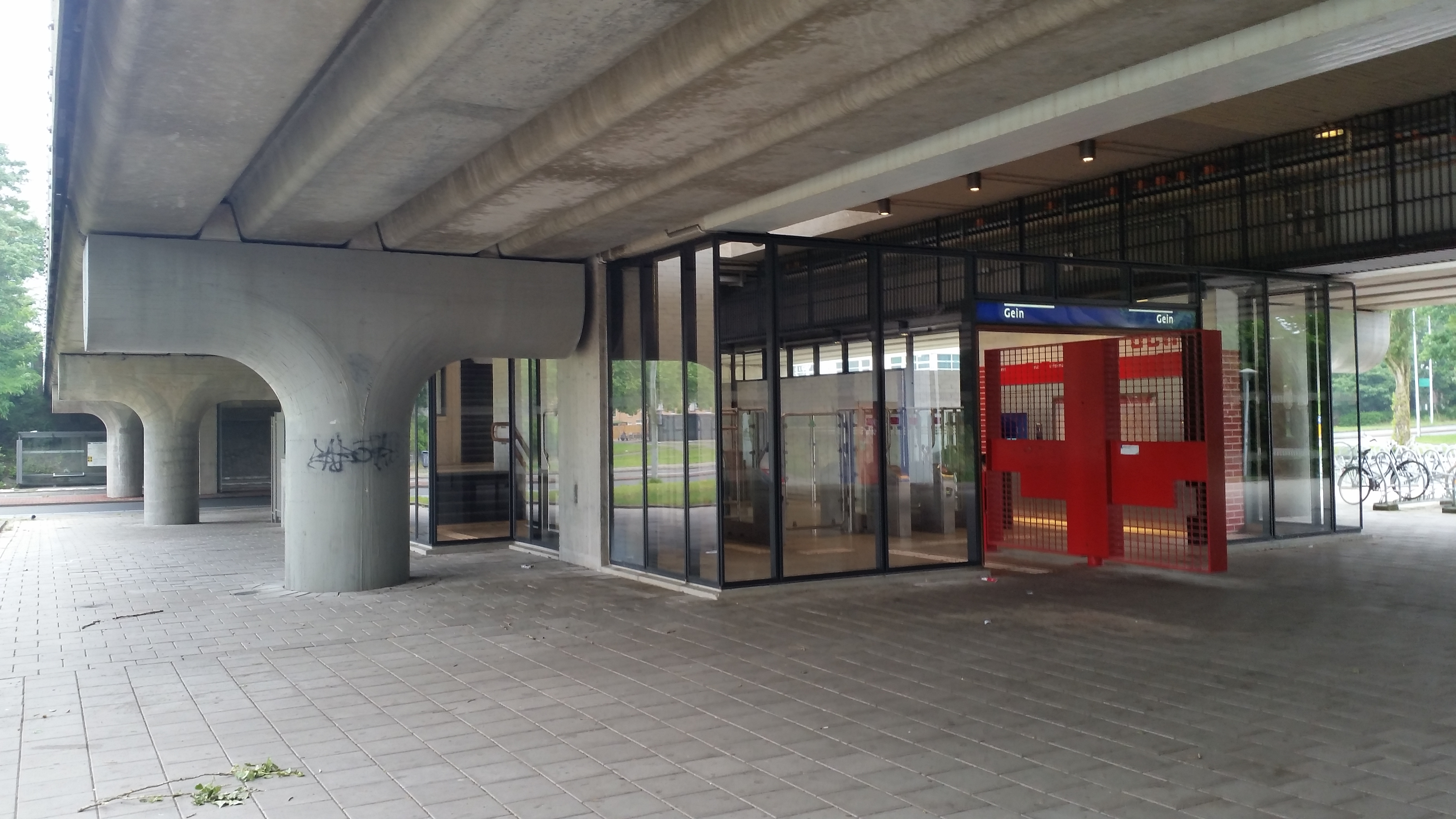 Wageningenmetrobrug in Amsterdam-Zuidoost (juni 2020)